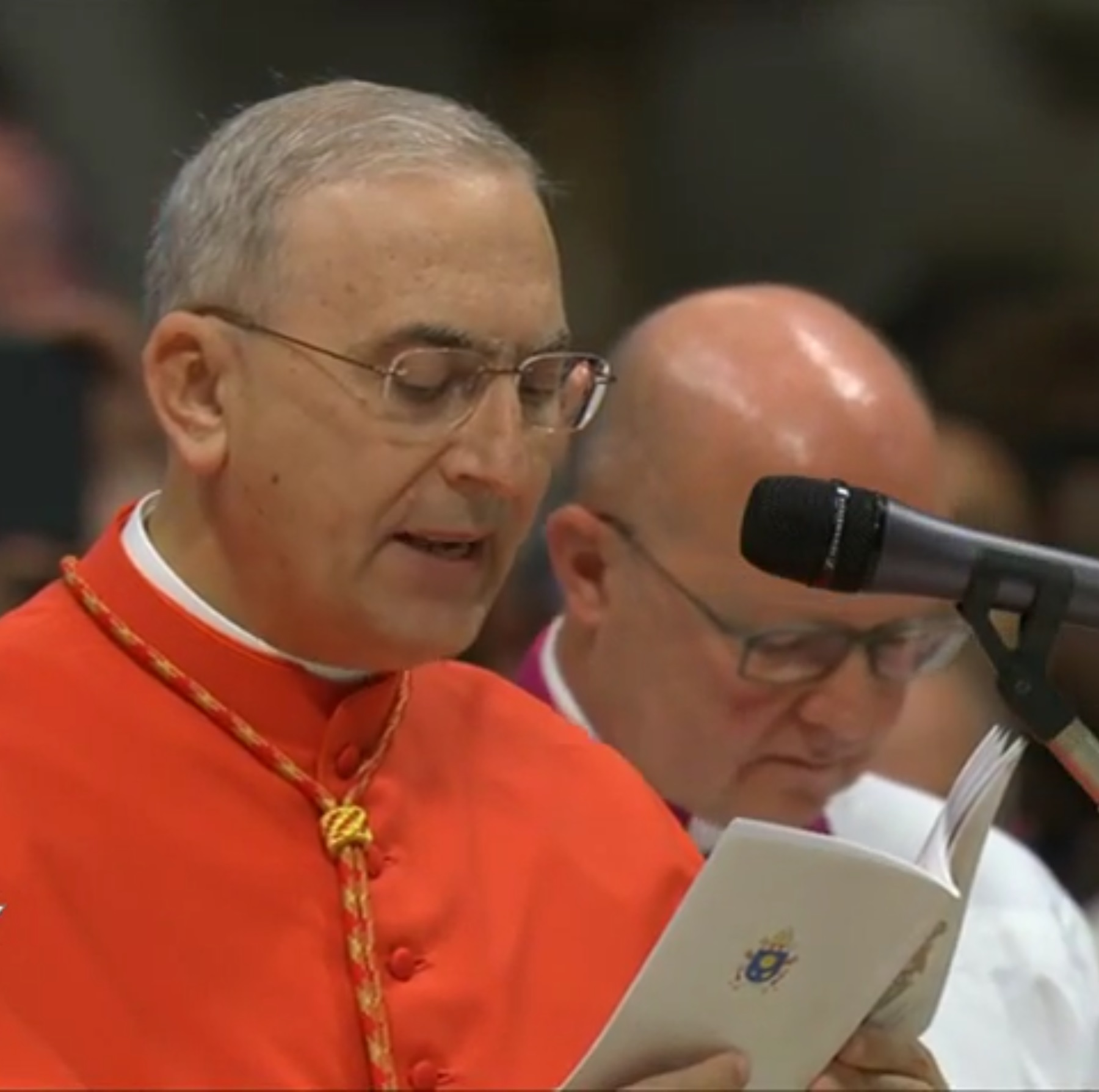 Le prélat Baltazar Mario Zenari au cours du consistoire ordinaire public du 19 novembre 2016 donné par le pape François, le créant cardinal de la Sainte Église Romaine, avec la diaconie de Santa Maria delle Grazie alle Fornaci fuori Porta Cavalleggeri.